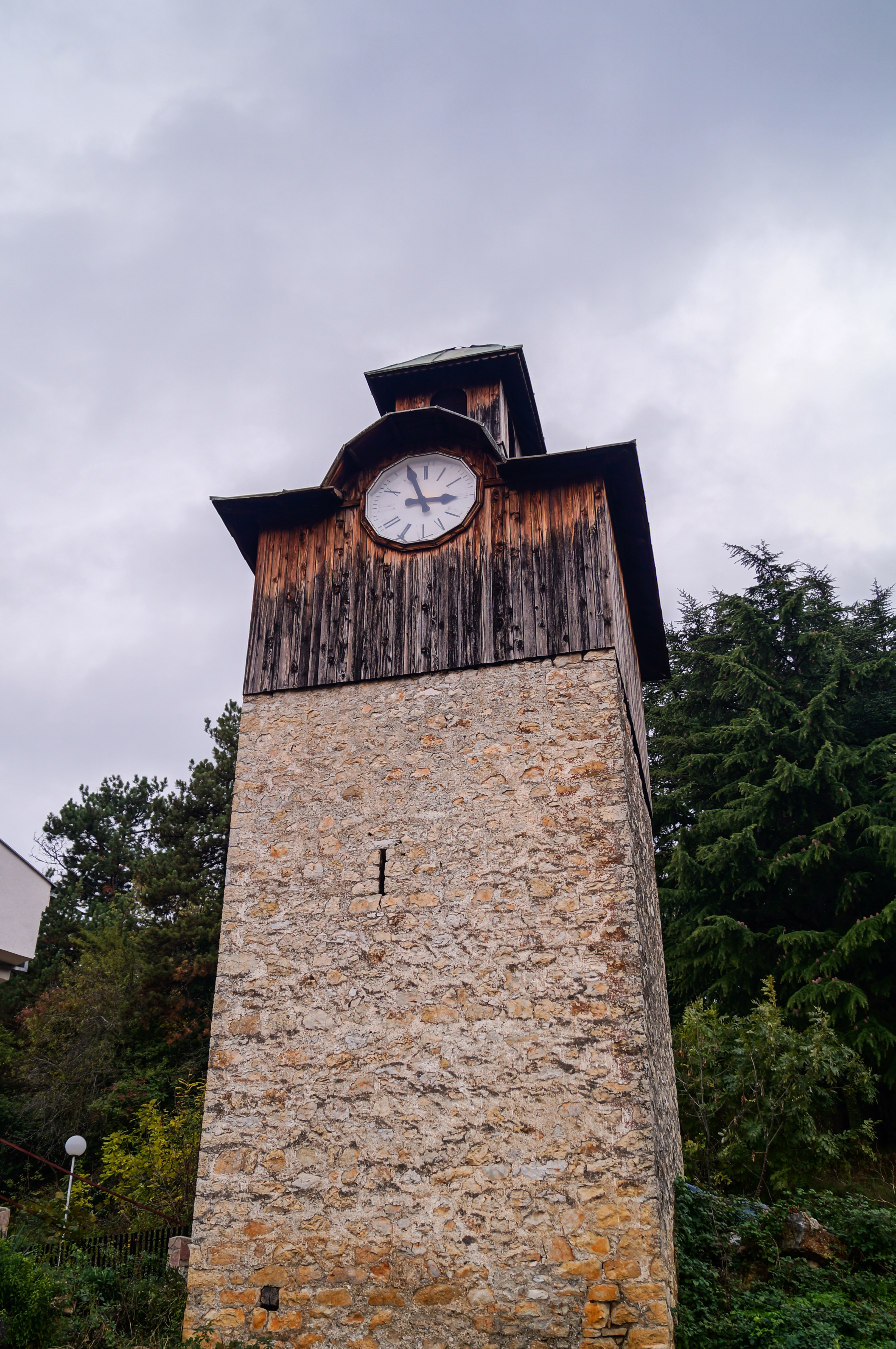 Саат Кула на Охридксото Кале.